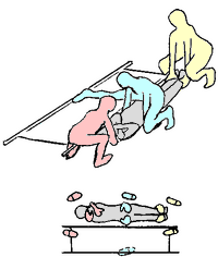 Relevage avec un pont néerlandais à quatre secouristes. Illustration du haut : vue de trois-quart plongeante ; illustration du bas : vue de dessous, avec les positions des mains et des pieds. Auteur : Christophe Dang Ngoc Chan (Cdang), dessin original numérisé retouché par un logiciel de dessin.